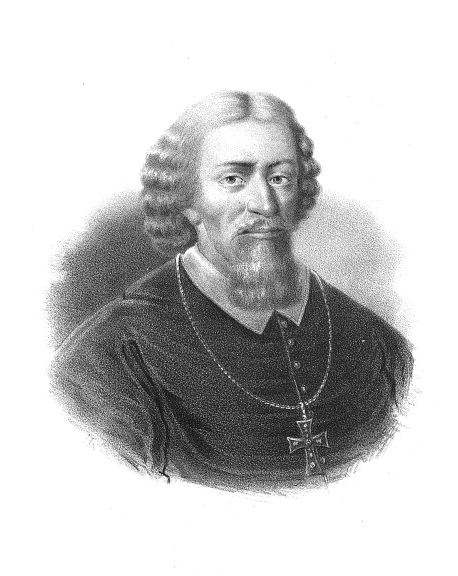 Andrzej Leszczyński primate of Poland